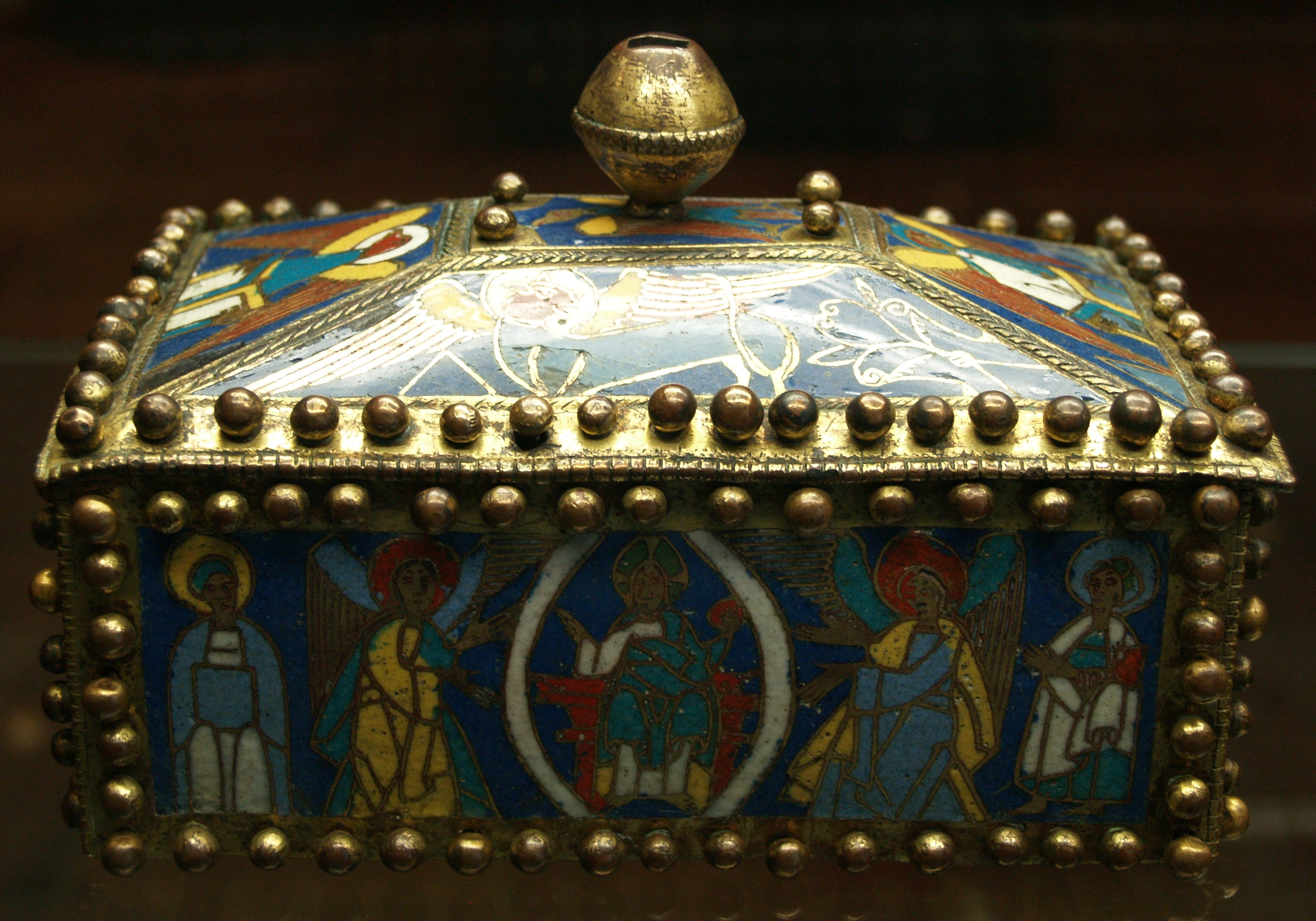 Berlín, Kunstgewerbe Museum, relicario de esmaltes en champlevé.